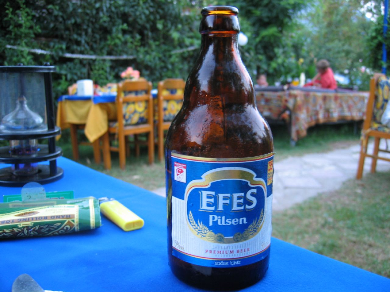 Efes stout